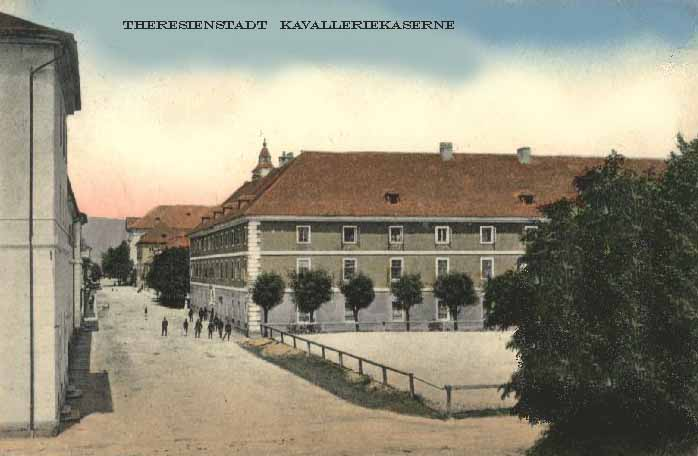 Theresienstadt k.u.k. Kavalleriekaserne